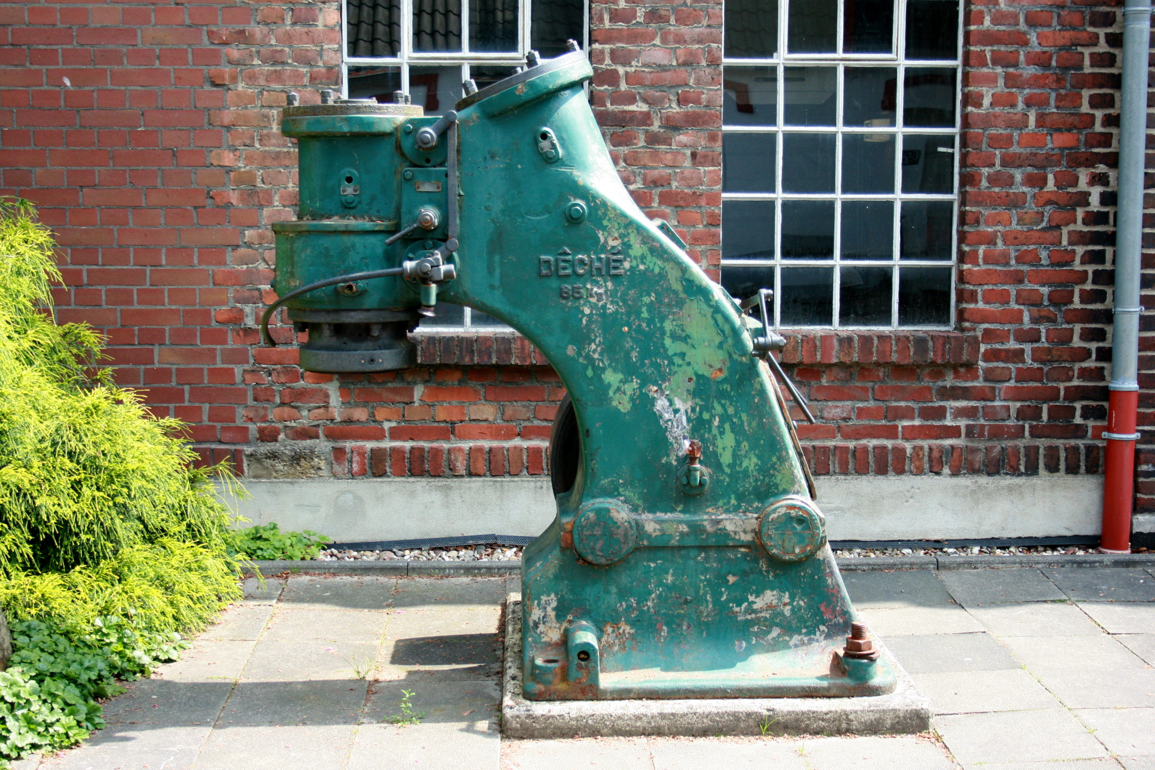 Freudenthaler Sensenhammer in Leverkusen, Ortsteil Schlebusch. Bestandteil des Industriemuseums Freudenthaler Sensenhammer. Standort vor dem alten Produktionsgebäude.